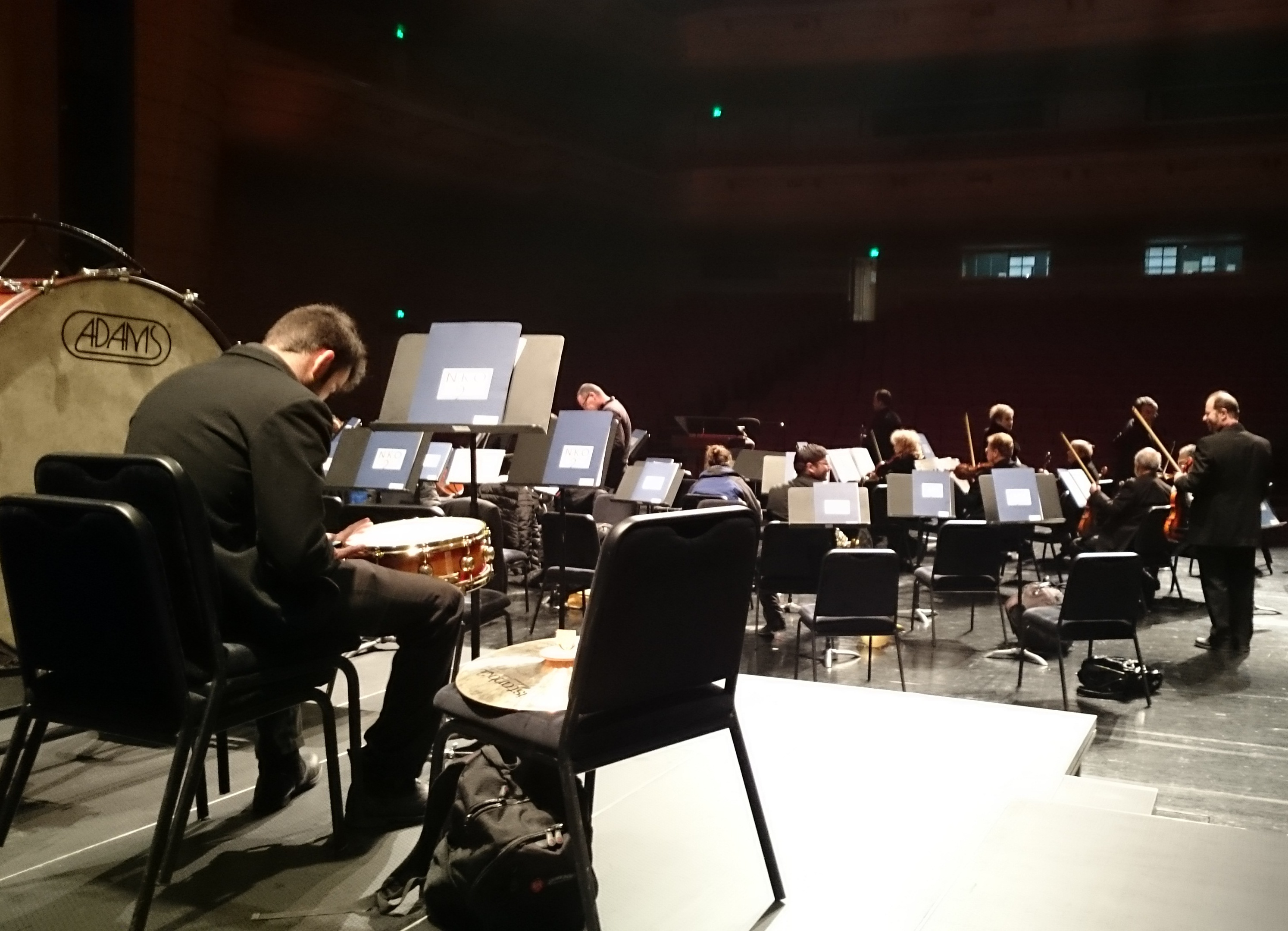 תזמורת נתניה - הקאמרית הקיבוצית במהלך מסע ההופעות בסין (2015) מנצח שלו עד-אל